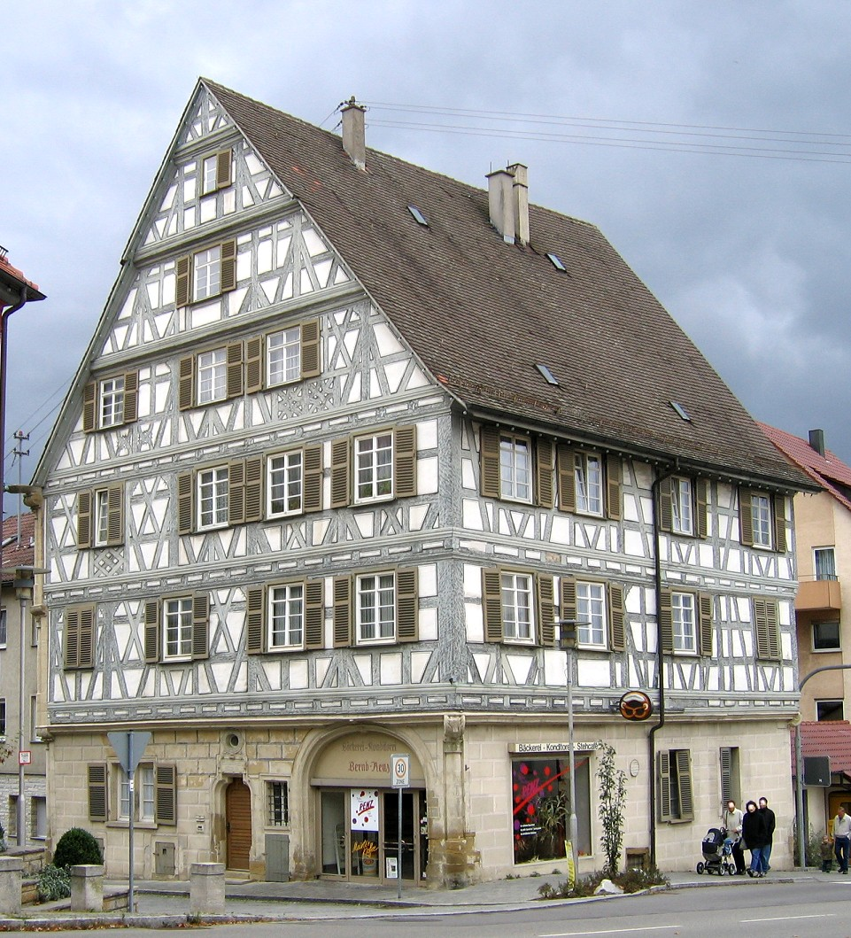 Kirchberg an der Murr, Altes Pfarrhaus von von 1617